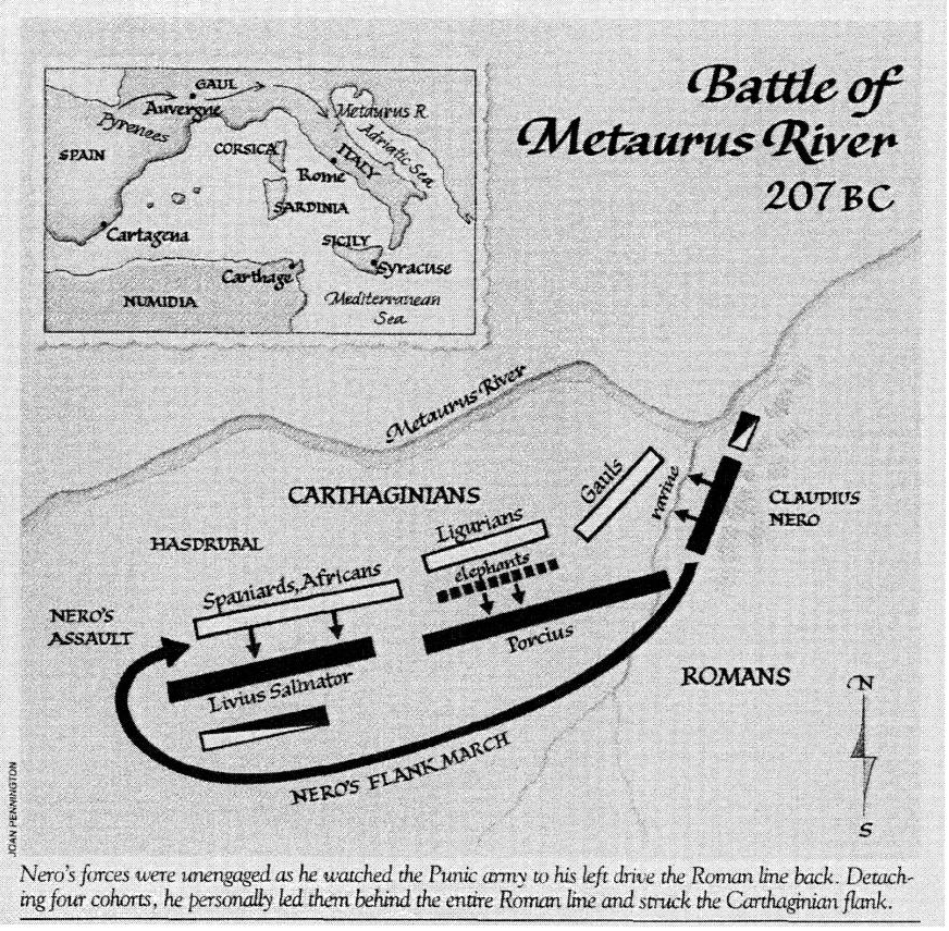 Контур бойових дій Метаврапід час Другої Пунічної війни. Левін, 2002